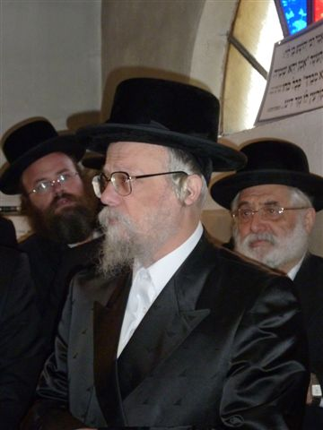 הרב יעקב הגר